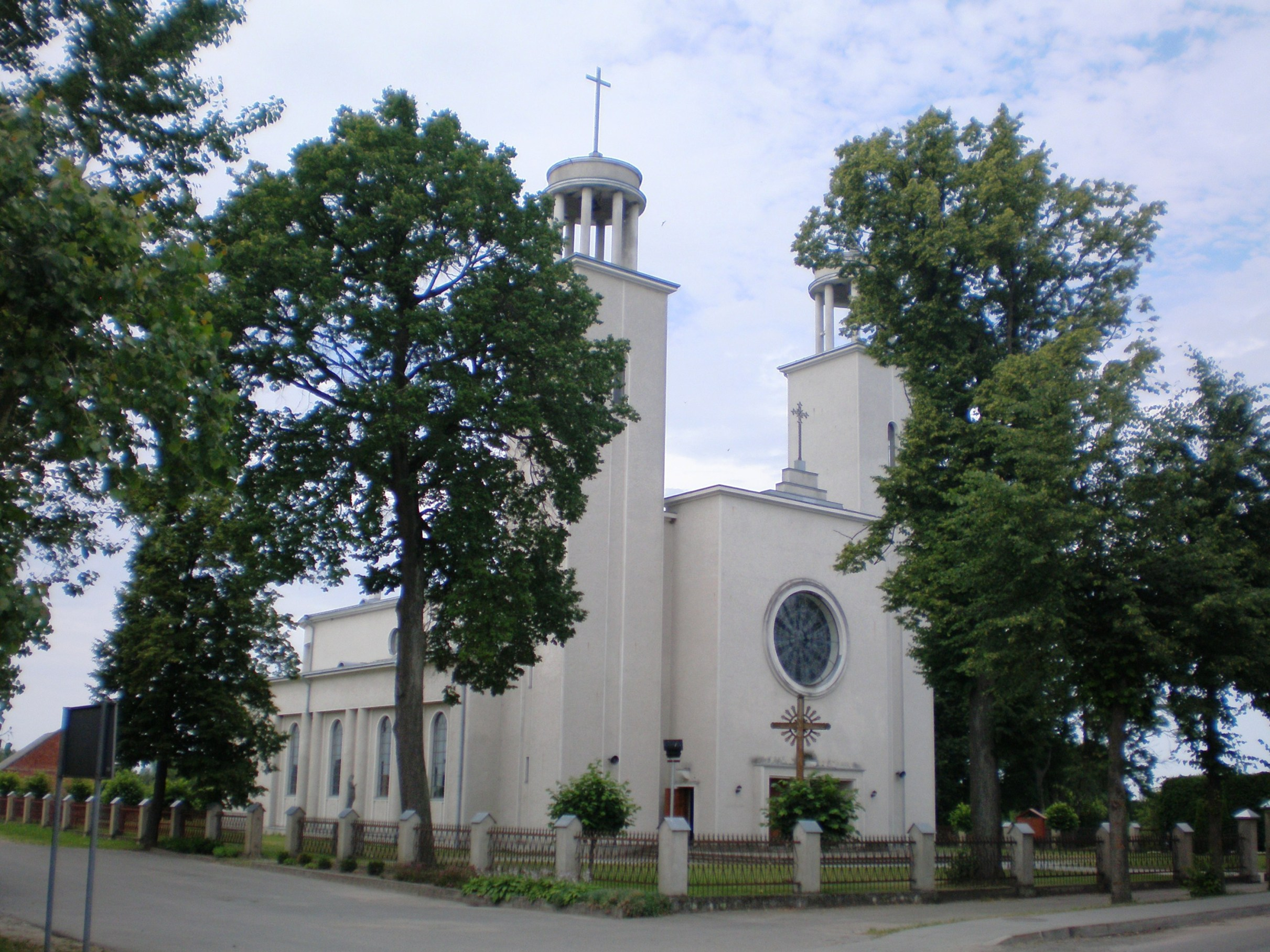 Pilviškiai, Vilkaviškio raj.